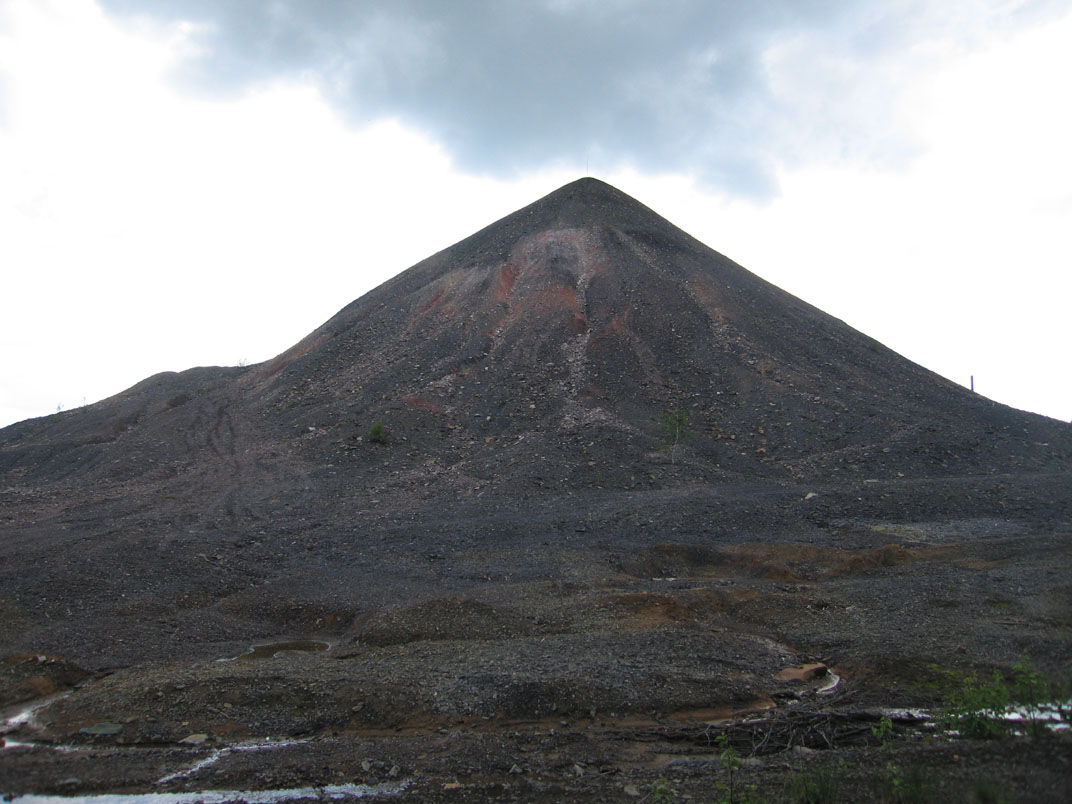 Отвал шахты Рудничная